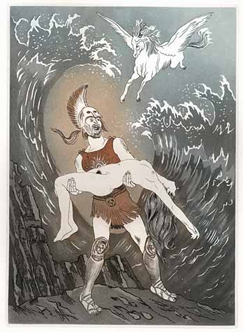 Aquarelle d'Ernest Millard de Bois Durand pour le poème des Trophées de Hérédia